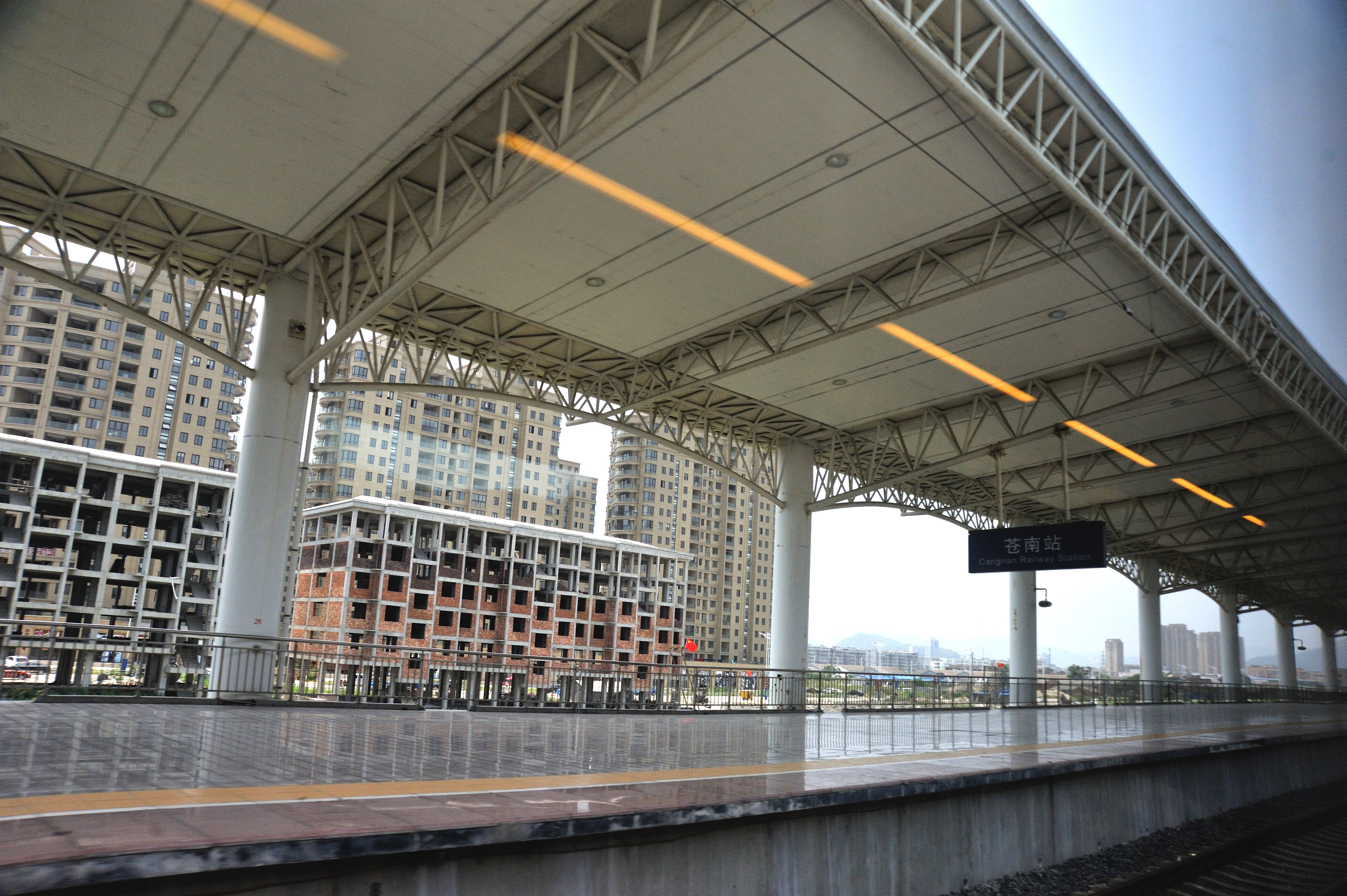 苍南站站台